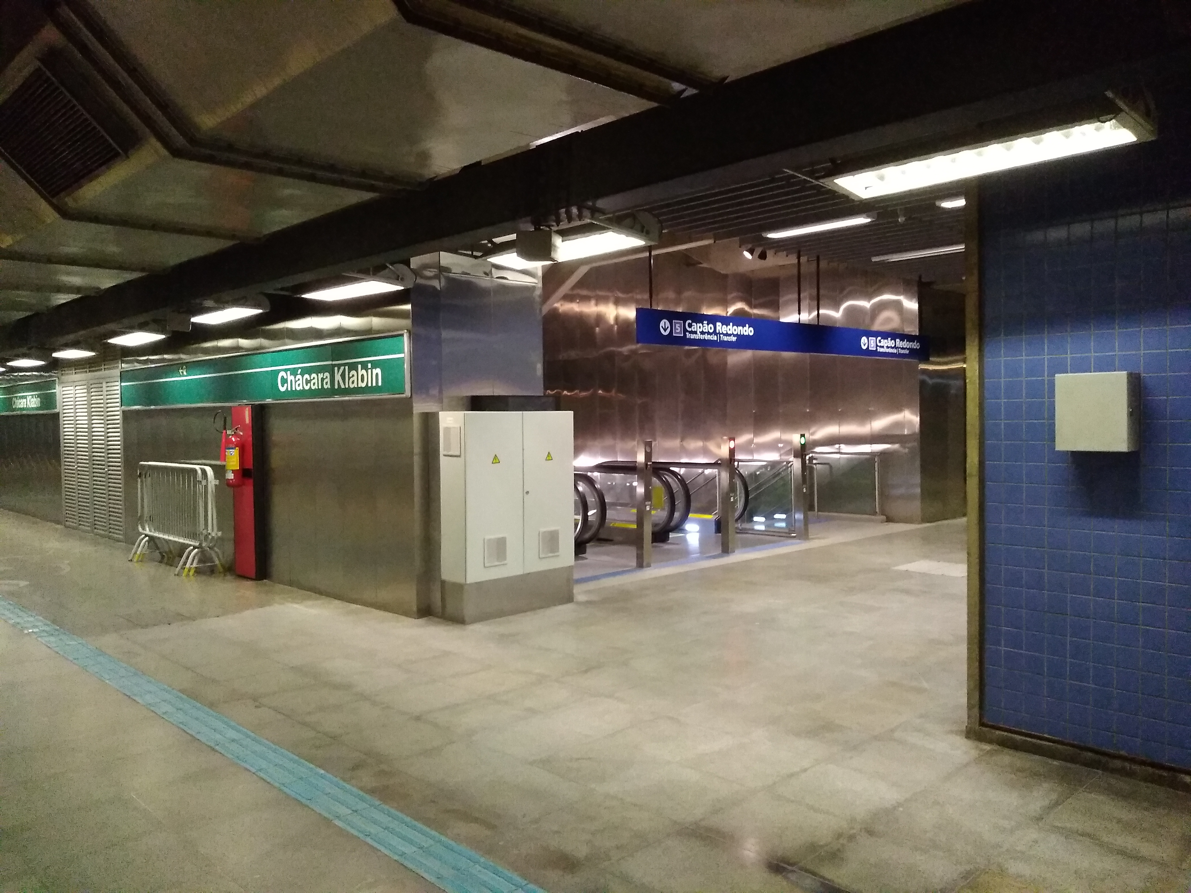 Estação de Metrô de São Paulo, Chácara Klabin. Plataforma central da Linha 2 Verde com acesso às plataformas da Linha 5 Lilás